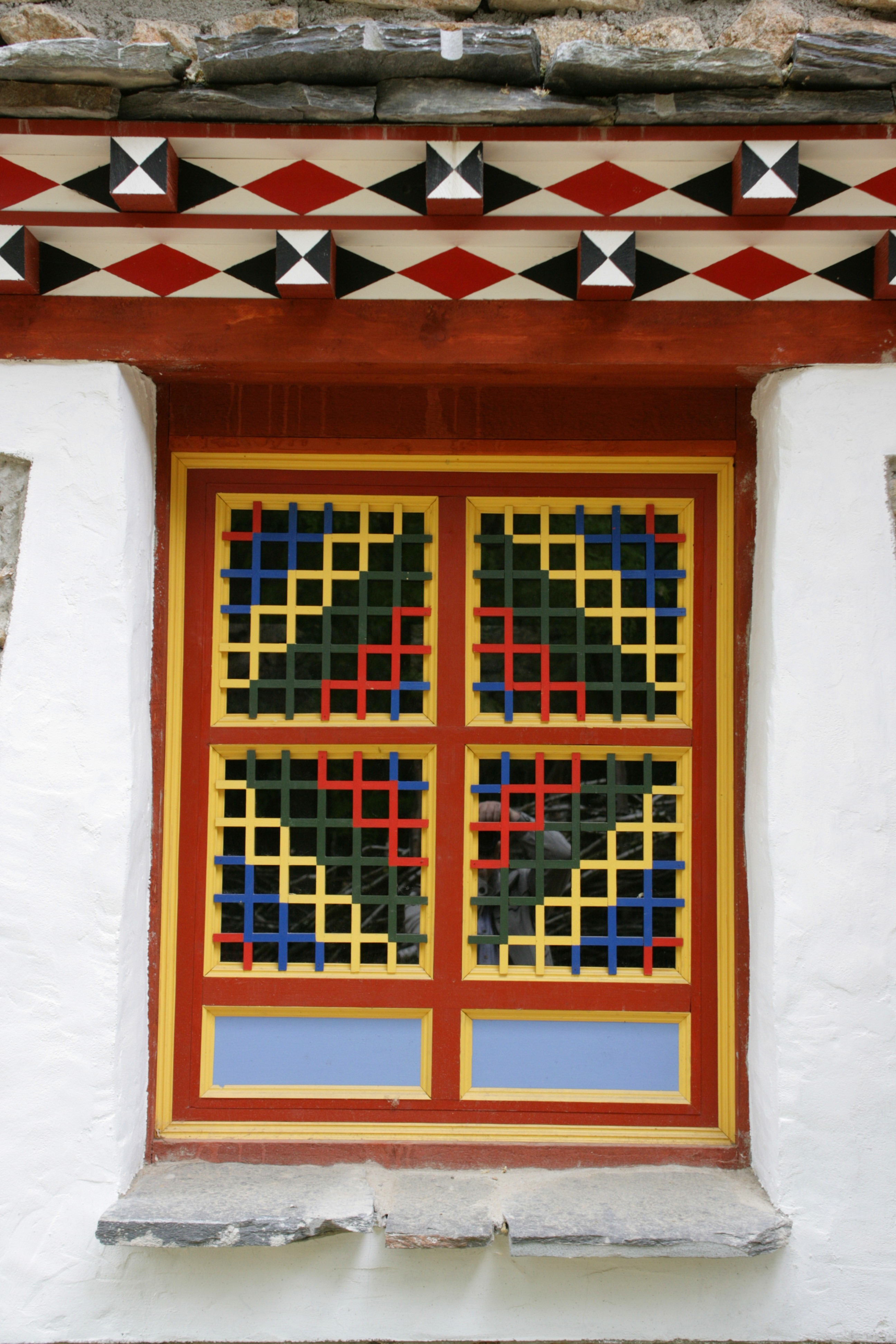 Tierpark in Görlitz